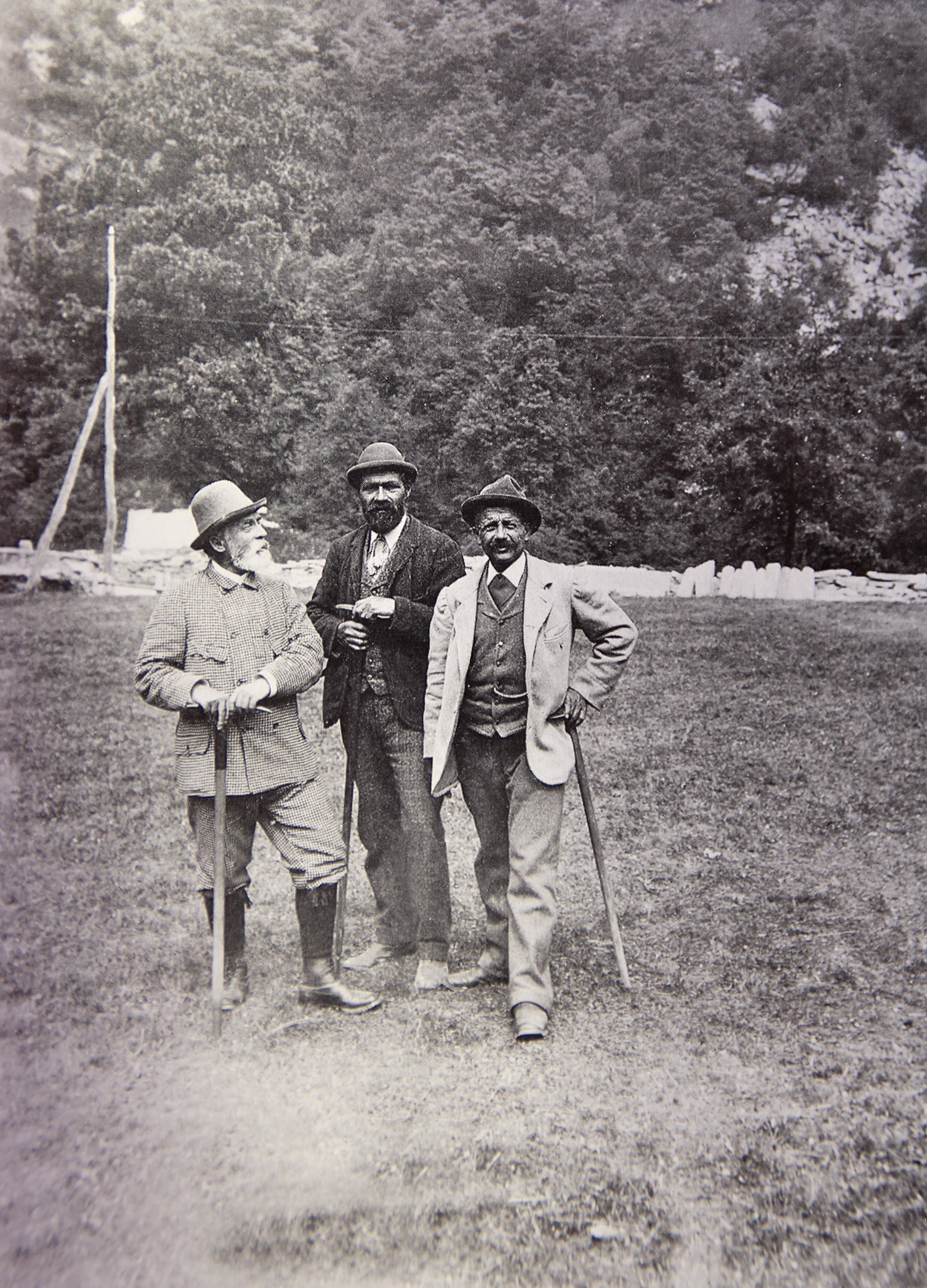 Christian Klucker (rechts) mit Anton von Rydzewsi (links) und dem Südtiroler Füher Mansueto Barbaria